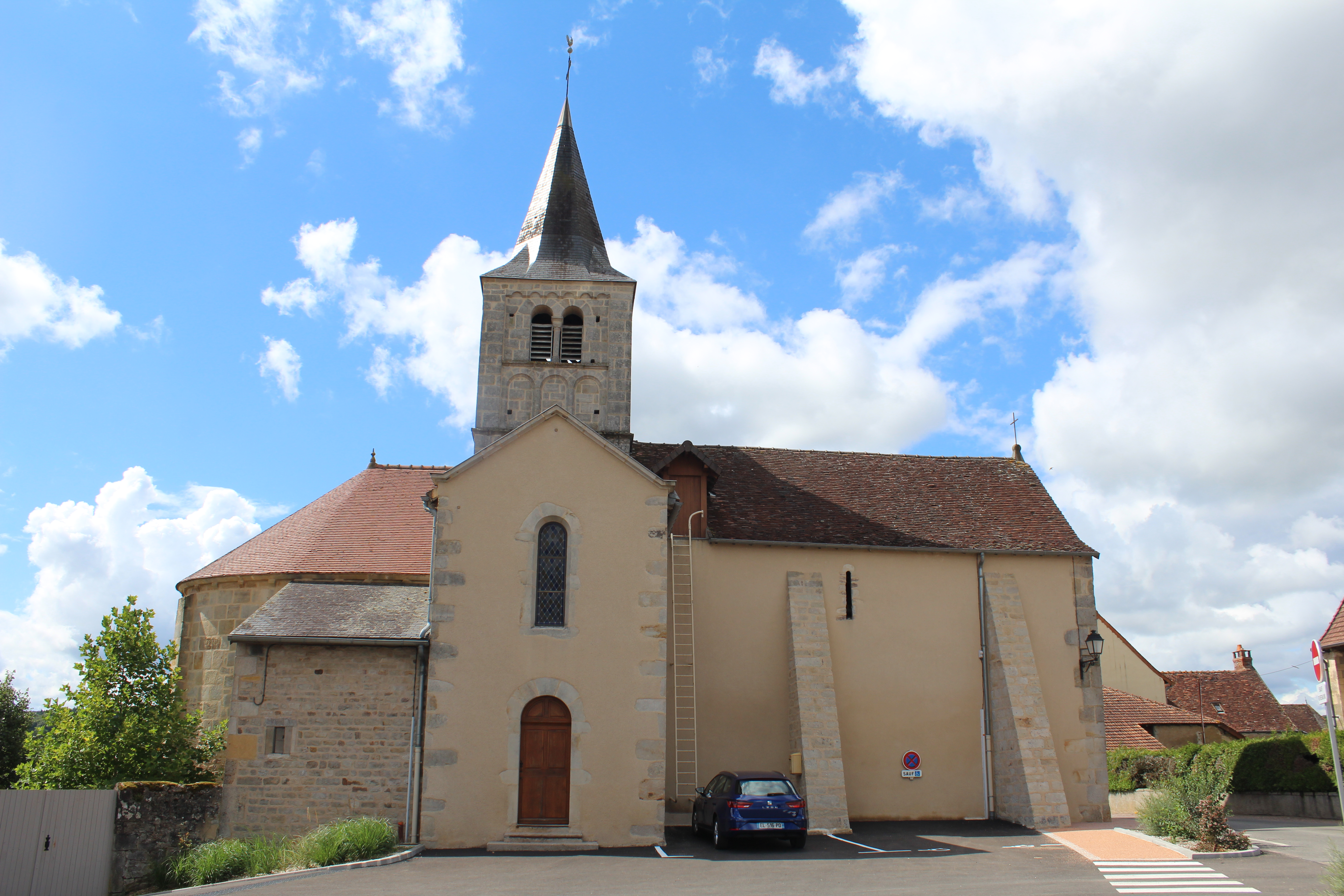 Église Sainte-Thérèse-de-l'Enfant-Jésus de Mornay, Saône-et-Loire.